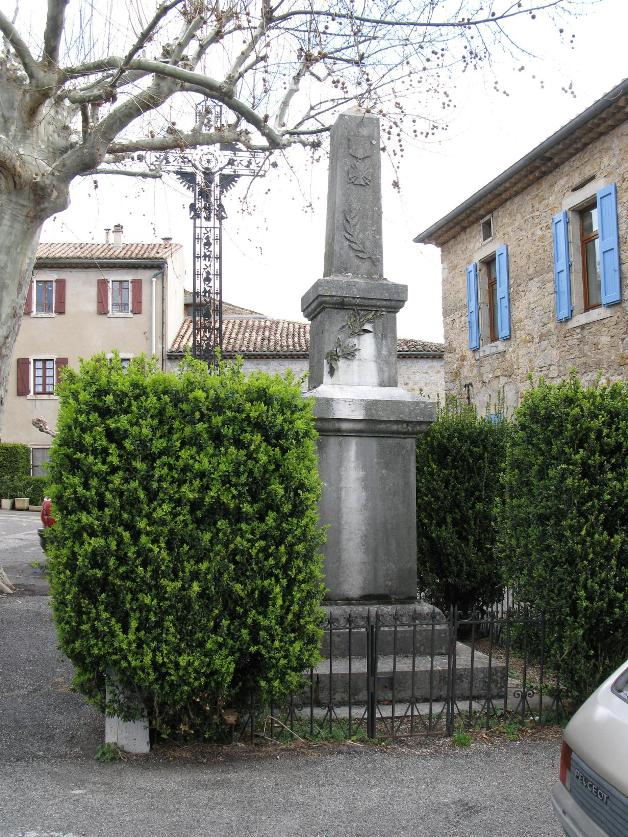 Monument aux morts de Les Assions